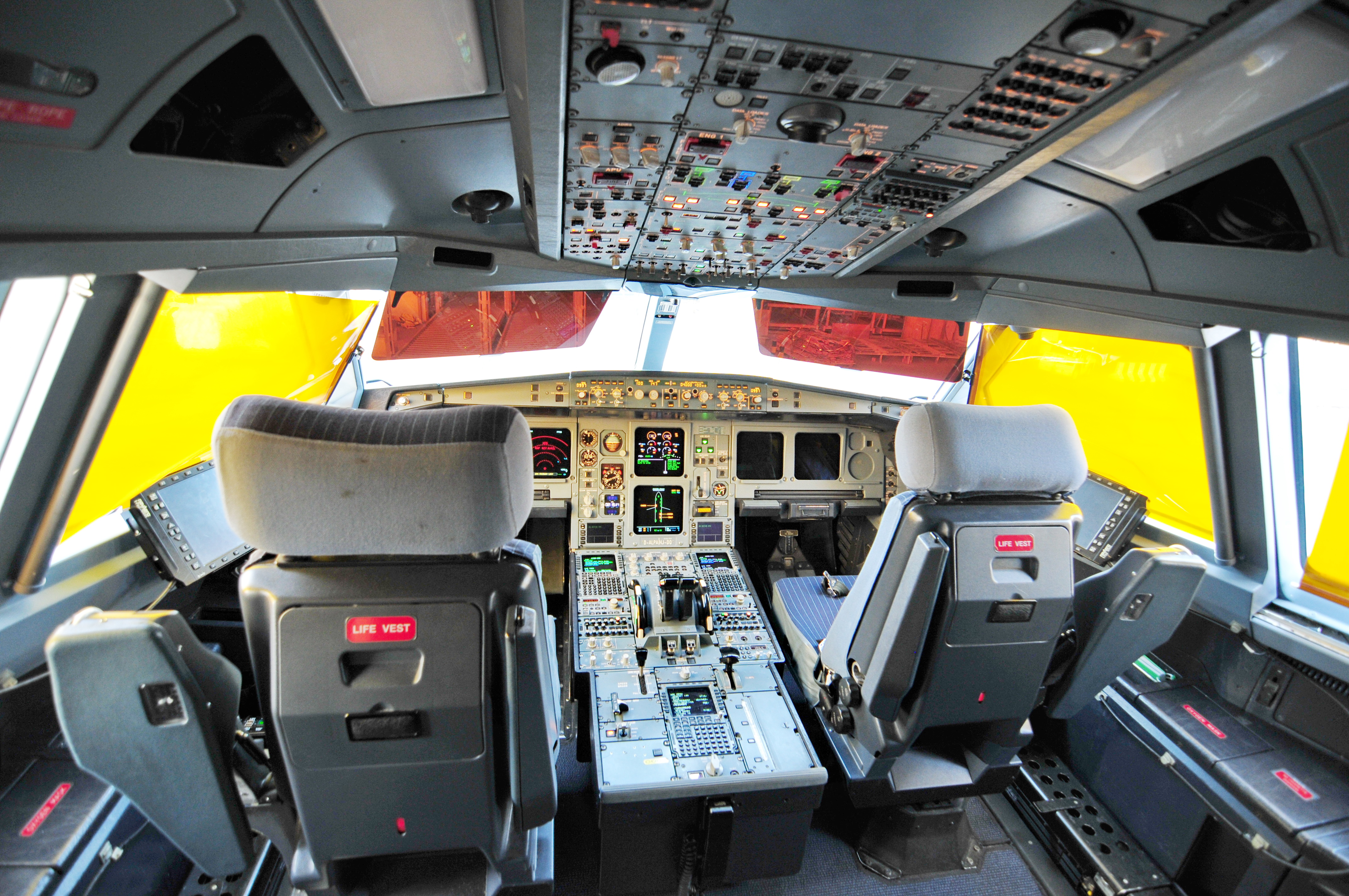 Airbus A330-200 D-ALPA der Airberlin in Abu Dhabi